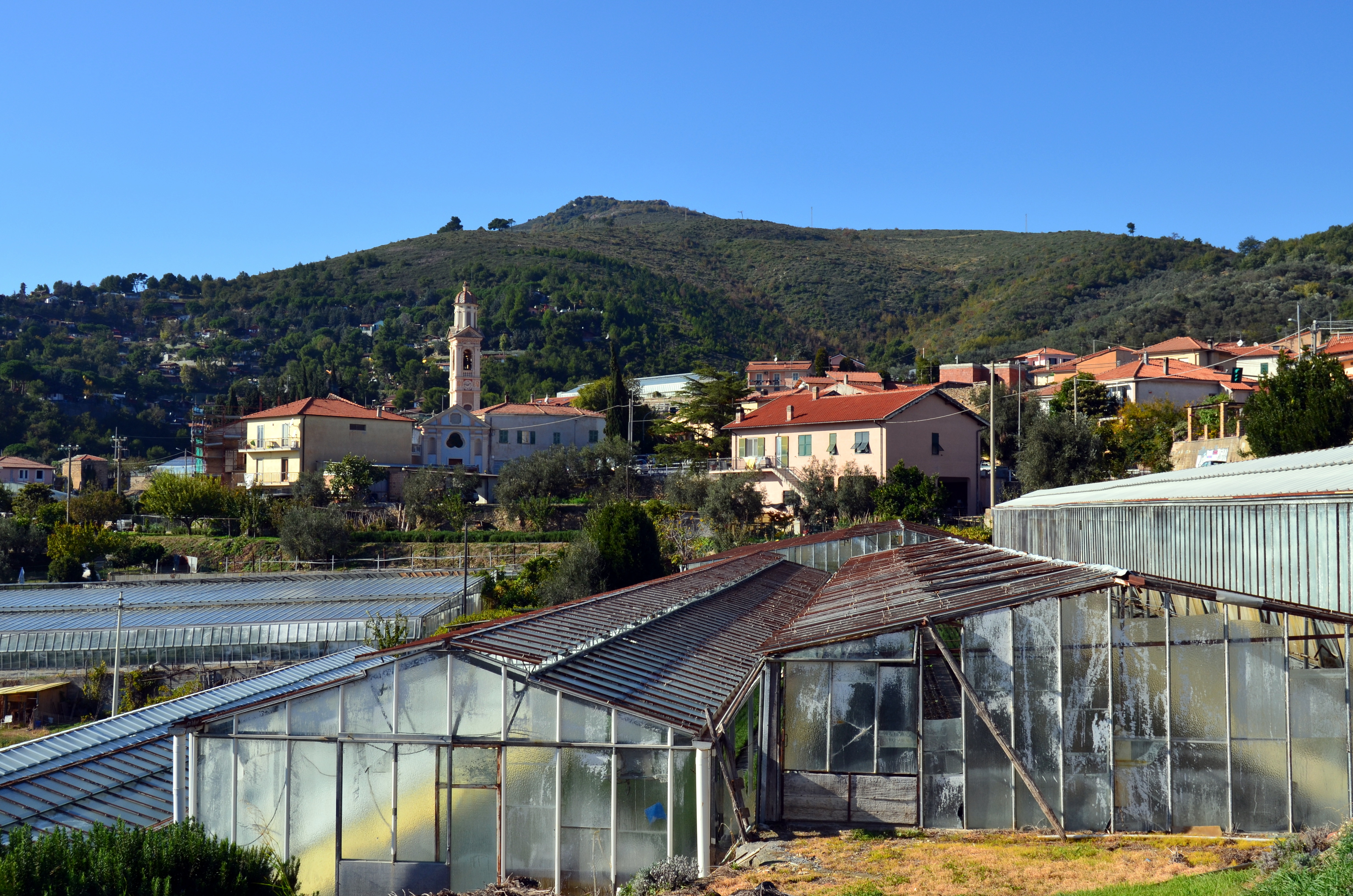 La chiesa di San Nicola, Cenesi, Cisano sul Neva, Liguria, Italia